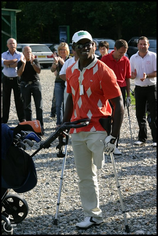 manuel de los santos